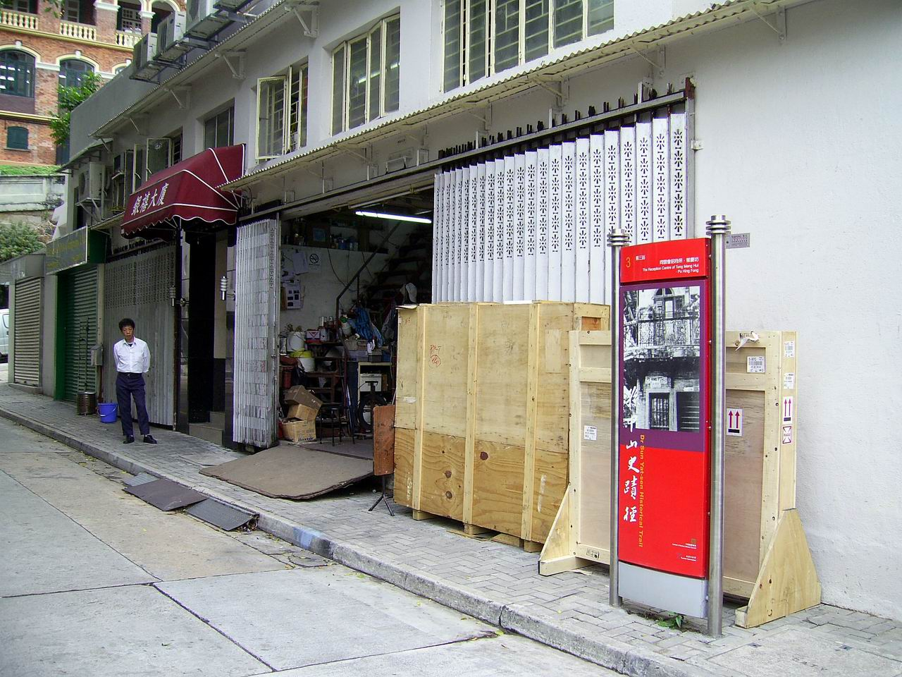 孫中山史蹟徑第三站